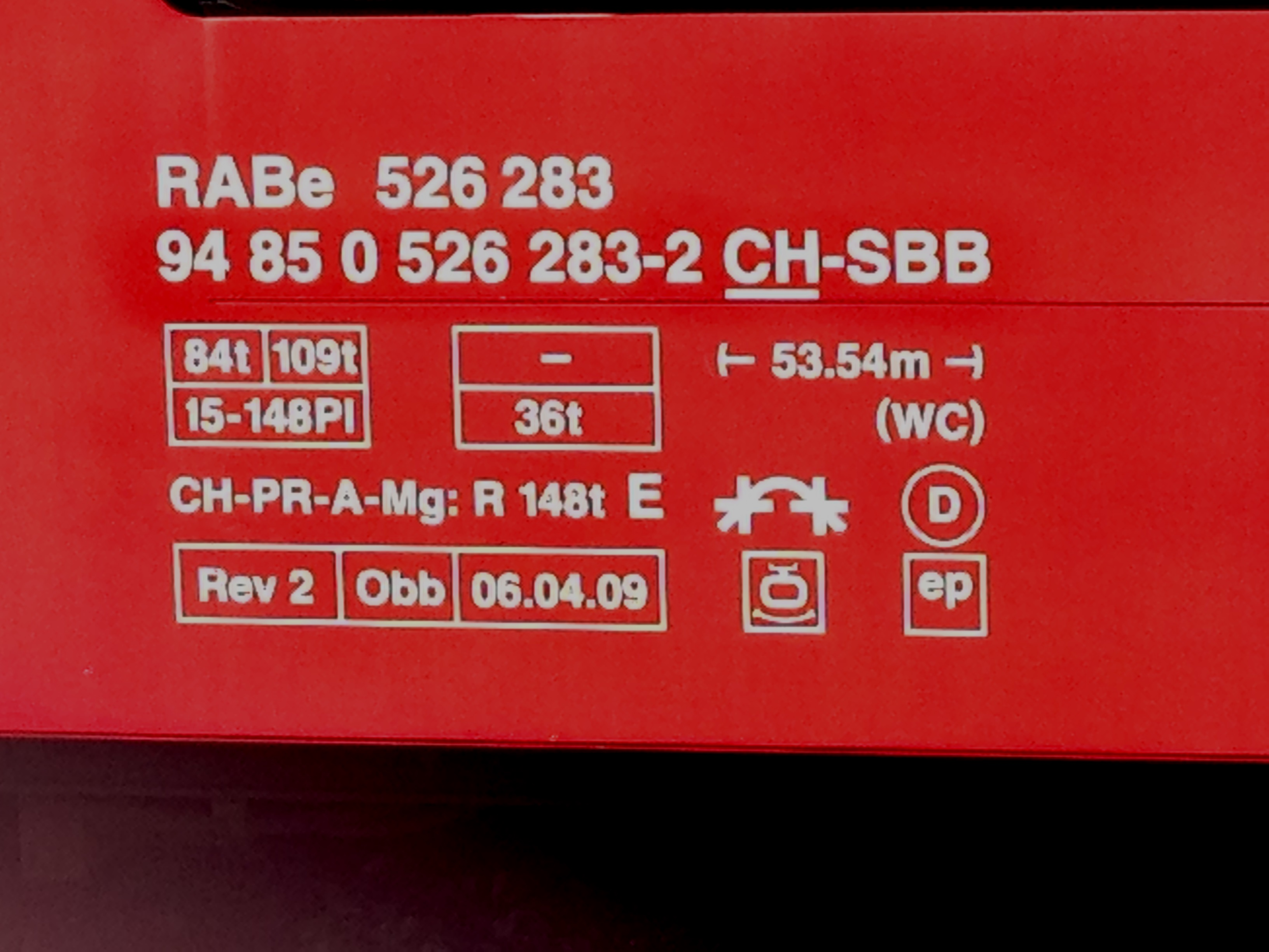 Anschrift mit TSI-Nummer am Triebzug RABe 526 283 (GTW 2/8)der SBB